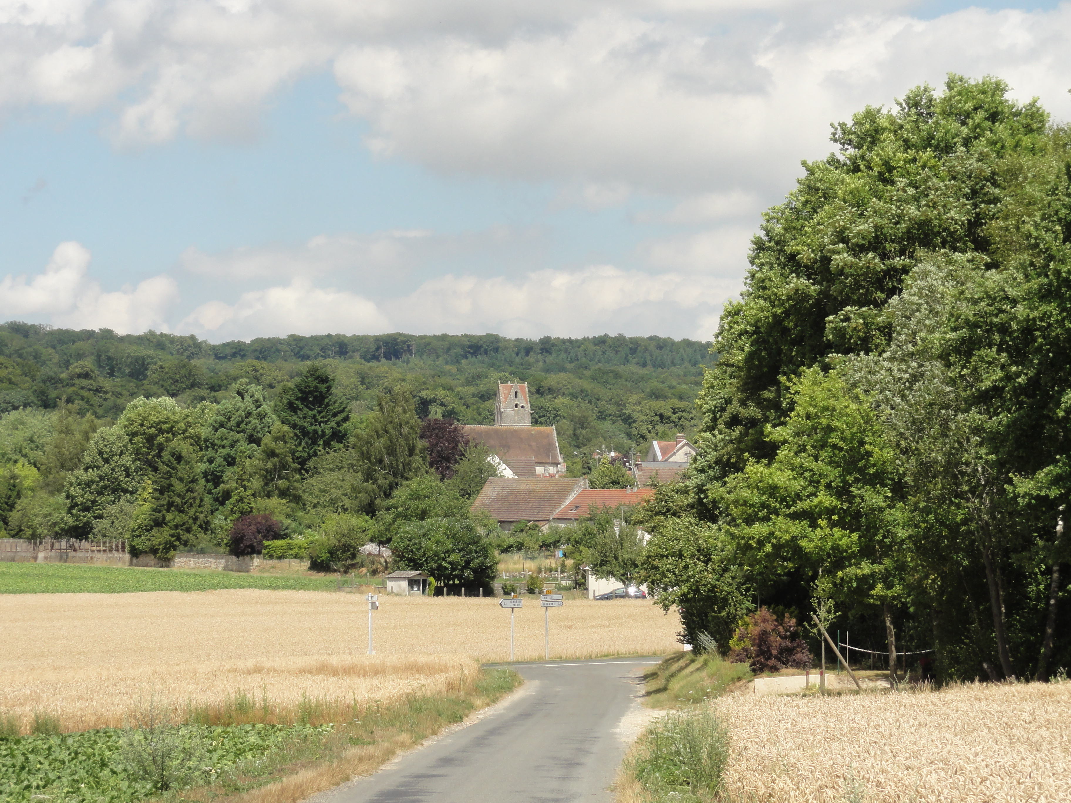 Église Saint-Léger d'Éméville (voir titre).